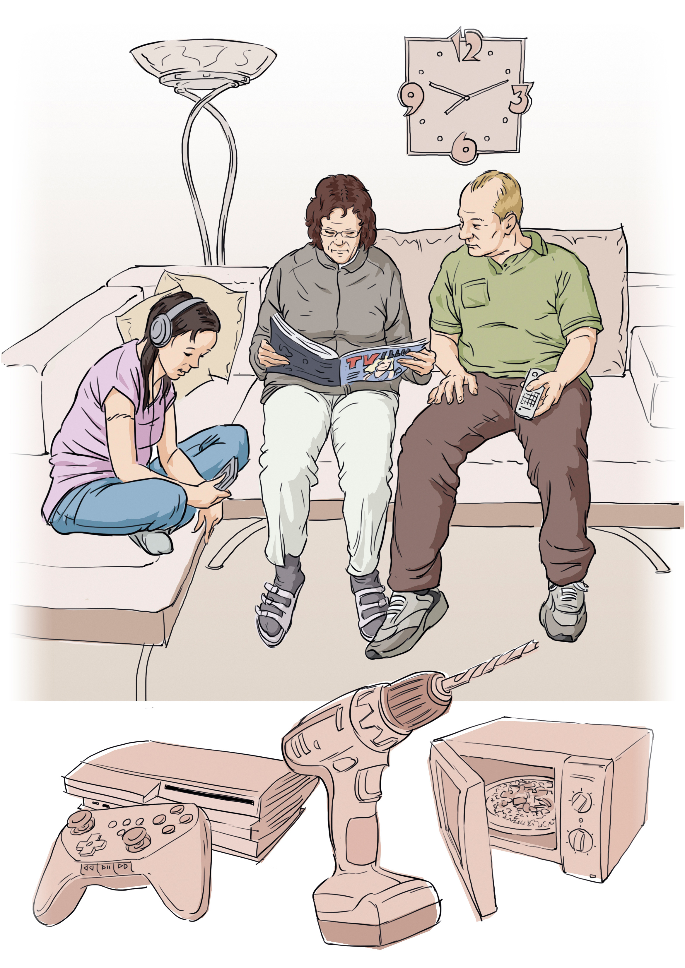 Grafische Darstellung des Typus "Eskapisten" aus der ARD-/ZDF-MedienNutzerTypologie. Beispielhafte Aussage: "Das Leben ist kompliziert."